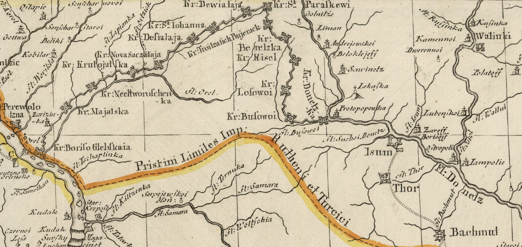 Украинская линия. Фрагмент из Карты театра военных действий в Русско-турецкой войне в 1737 году, которая составлена Ж. Н. Делилем для Российской Академии наук в 1745 году.